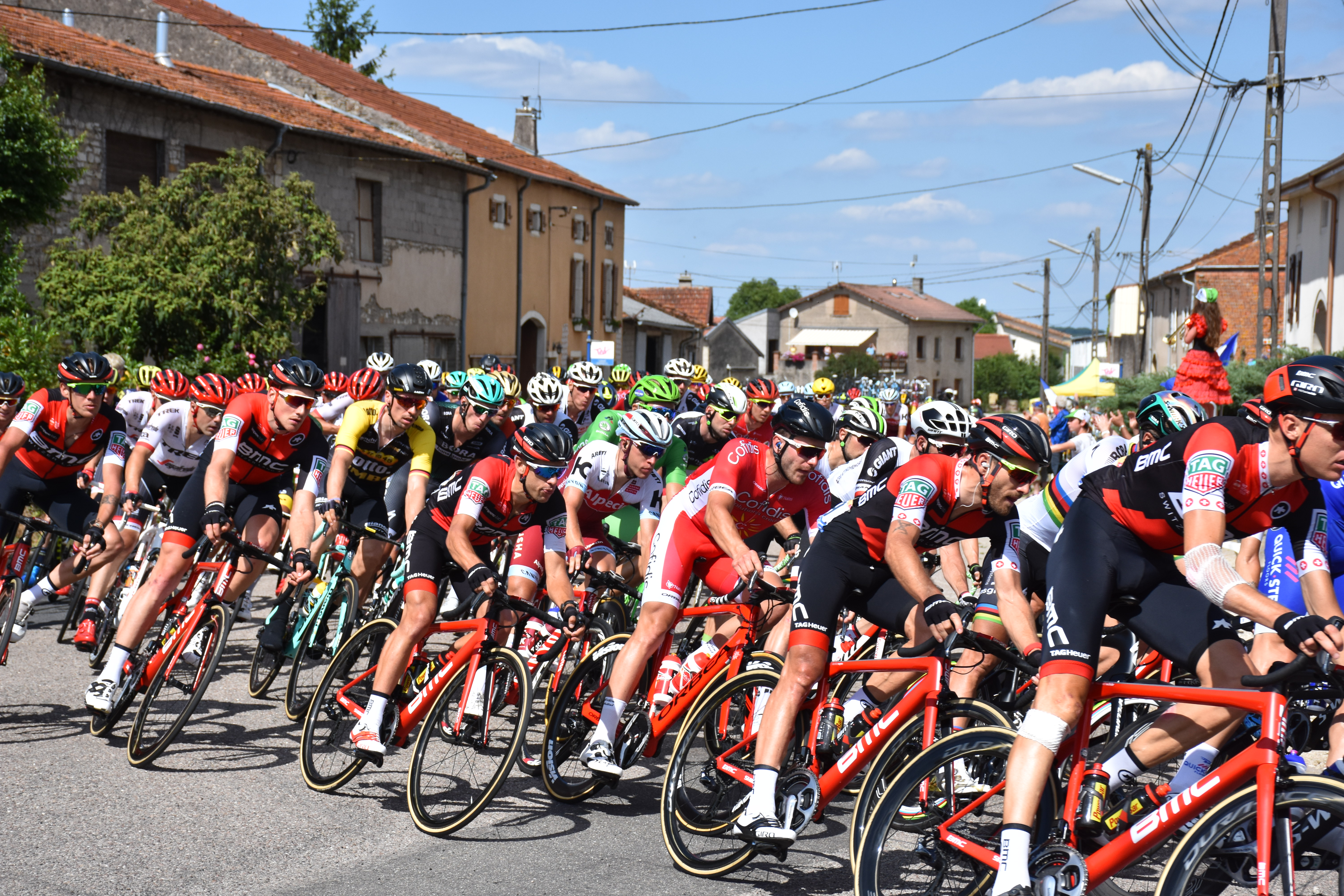 Le Tour à Laloeuf !